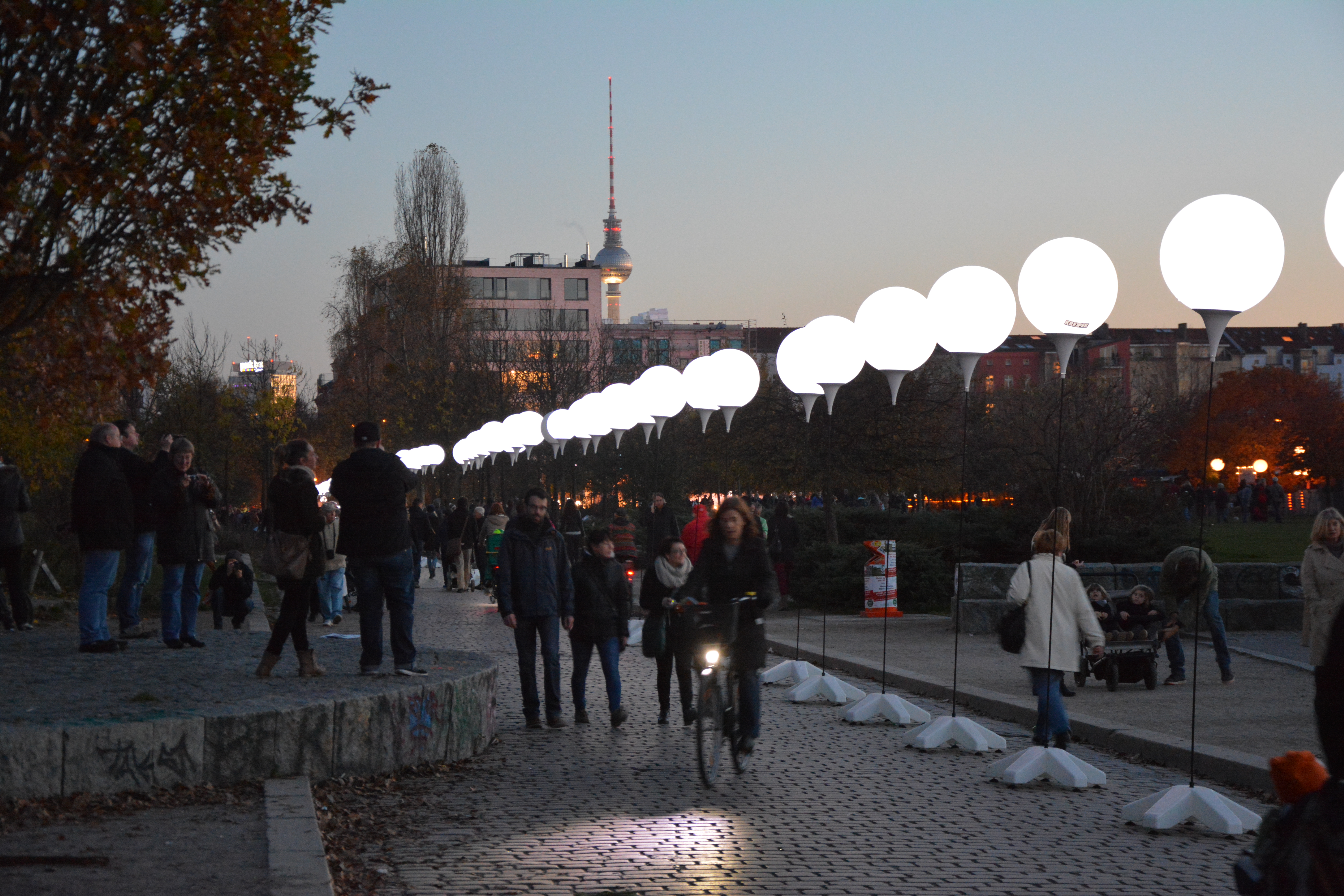 Lichtgrenze: Lichtinstallation mit rund 7000 weißen, leuchtenden Ballons zum Gedenken an den 25. Jahrestag des Falls der Berliner Mauer im vom 7. bis 9. November 2014